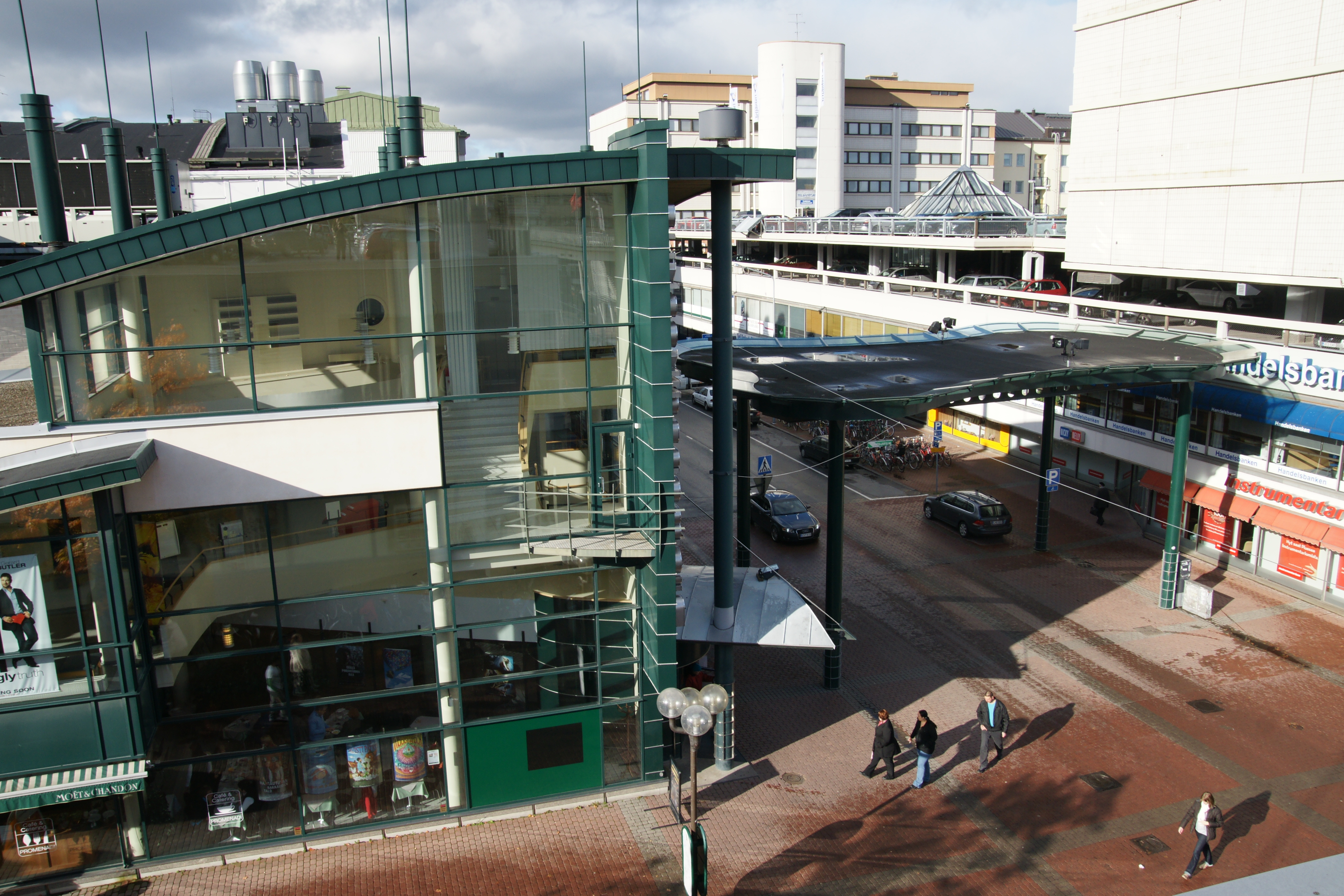 Promenadikeskus Porissa.